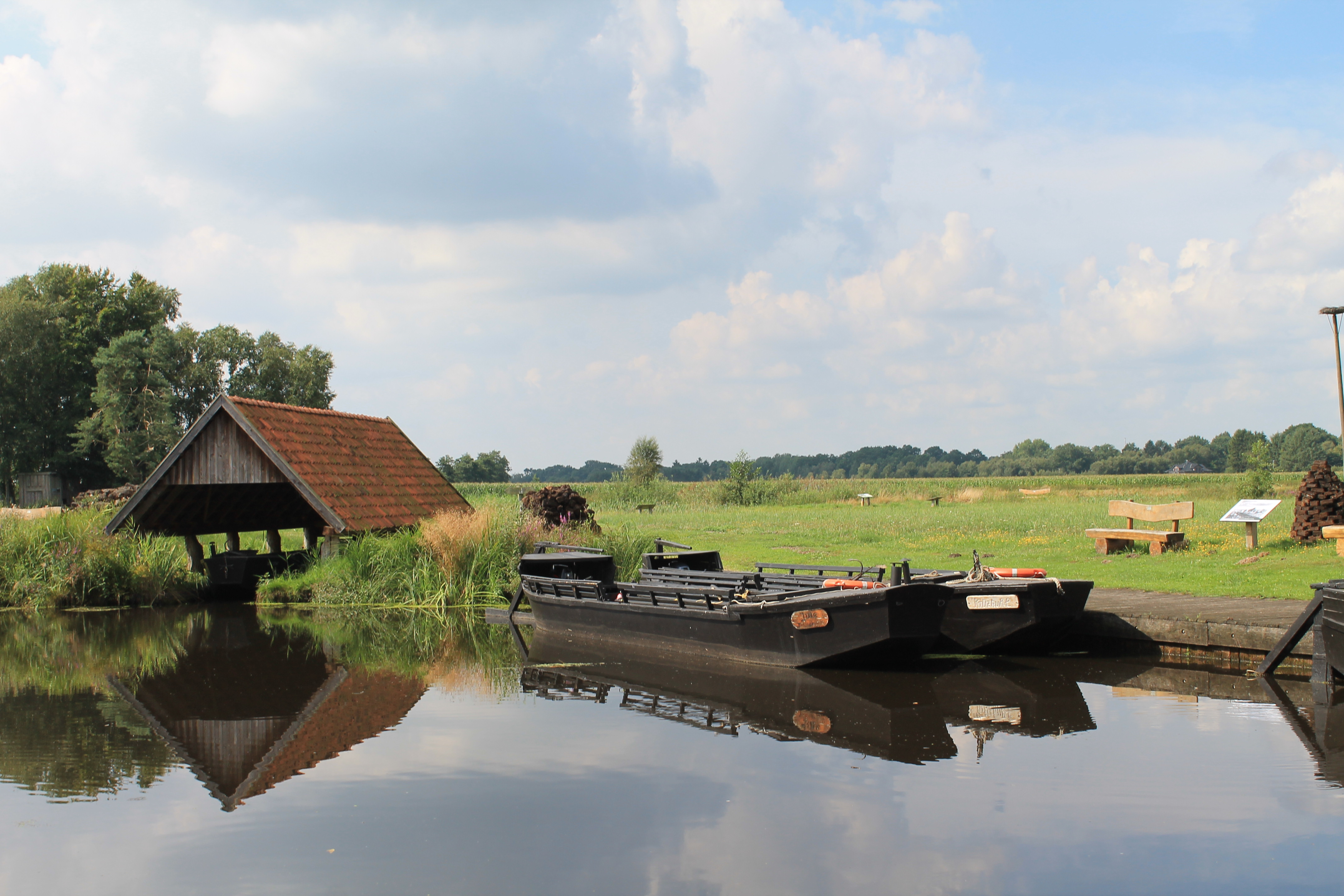 Wiederhergestellter Torfschiffhafen Kreuzkuhle im Teufelsmoor nördlich von Bremen, unter anderem mit Hafen unf Anlegesteg sowie mit Torfkaten und Informationstafeln. Am Anlegesteg liegen zwei nachgebaute Torfkähne (Halbhuntschiffe), die für Rundfahrten mit Touristen ausgebildet sind.